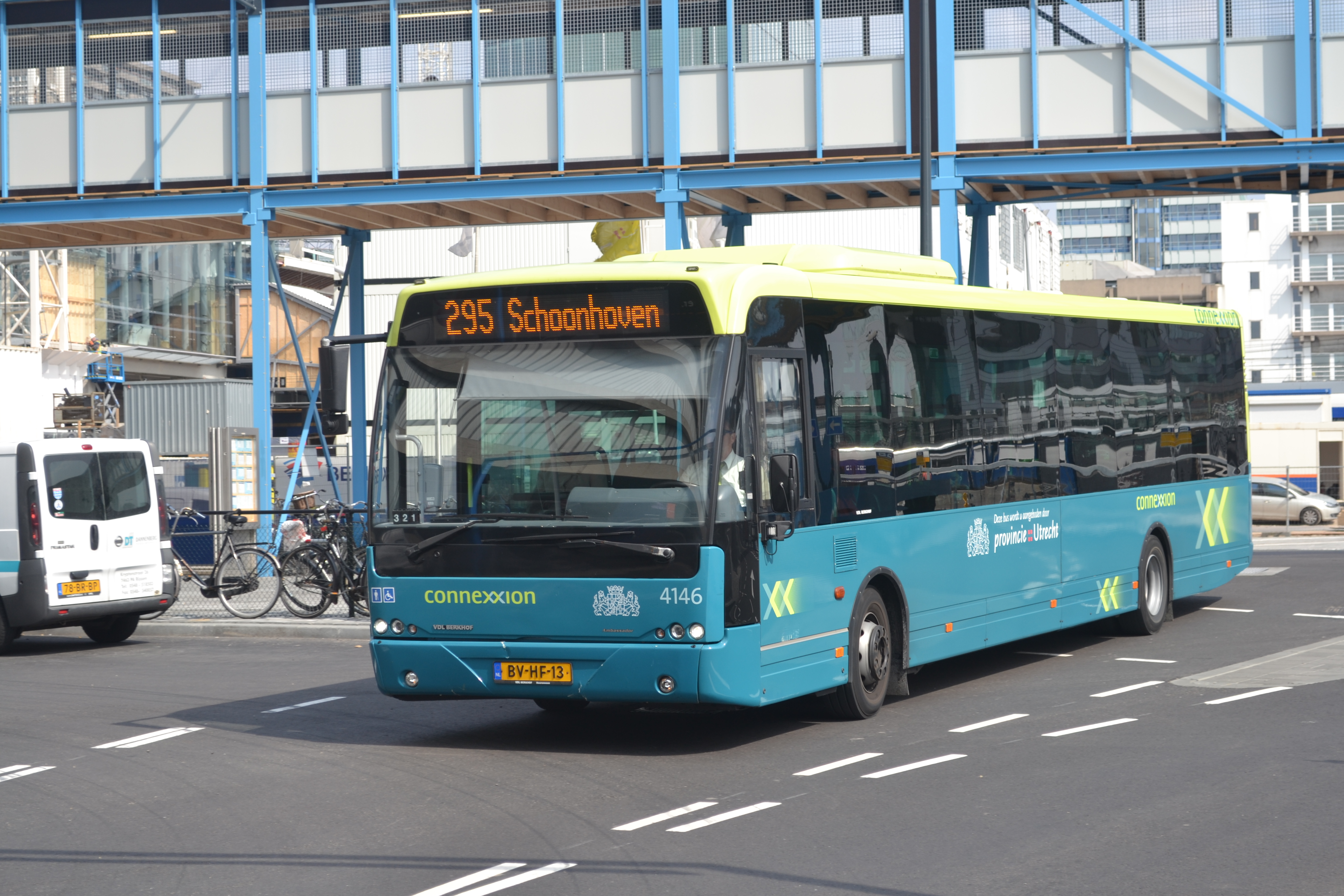 Lijn 195 en 295 worden samen door Connexxion en Arriva gereden. Hier een Connexxion-bus, de 4146, als lijn 295 naar Schoonhoven.